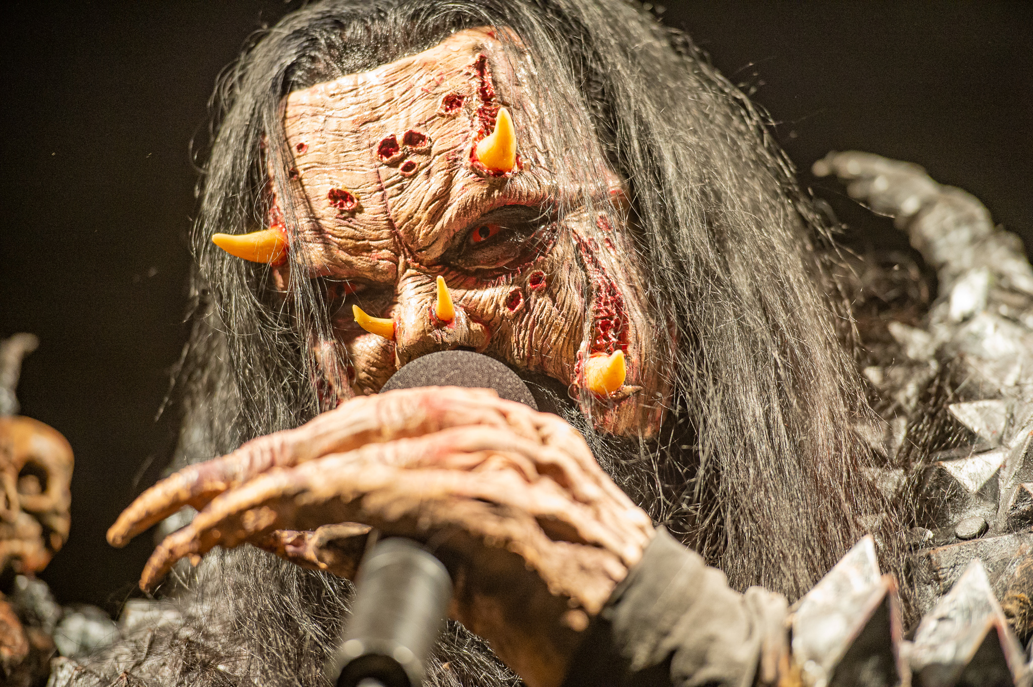 Concertbüro Franken,Der Hirsch,Konzert,Livekonzert,Livemusik,Lordi,Mr. Lordi,Musik,Tomi Petteri Putaansuu